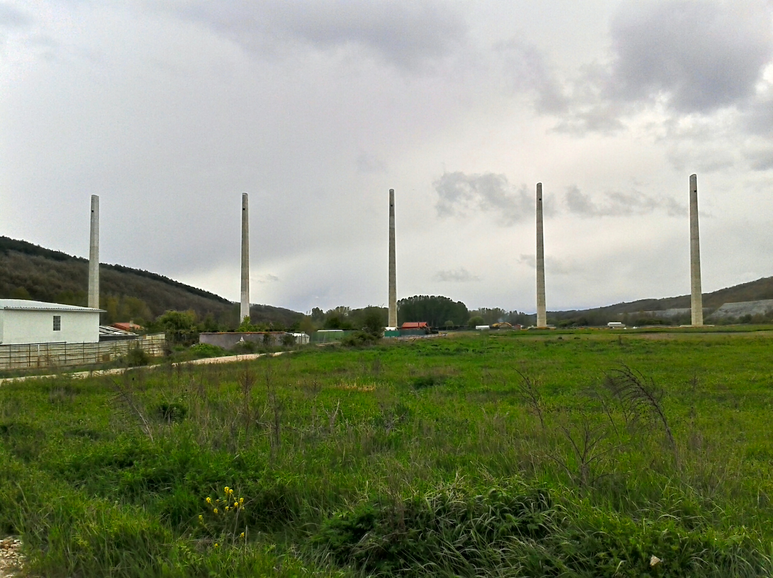 Pilares del viaducto de Guardo (España) en mayo de 2012